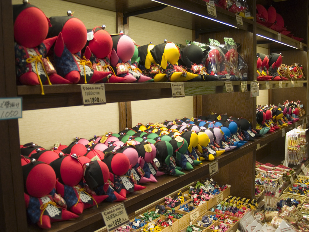 Sarubobo es como un amuleto de la suerte en Japon